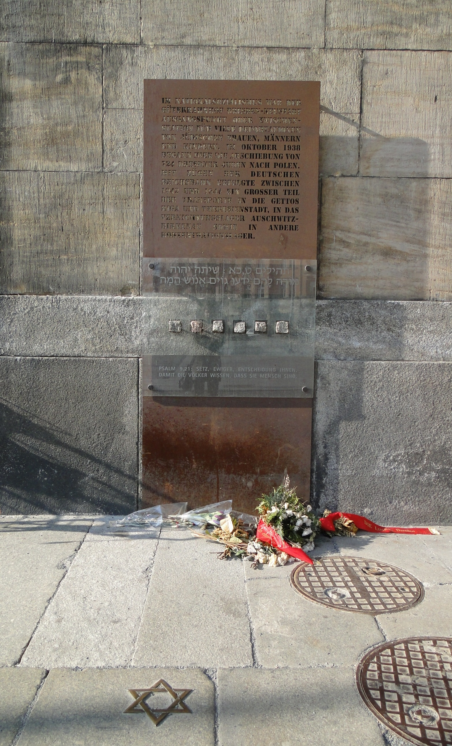 Gedenkstätte